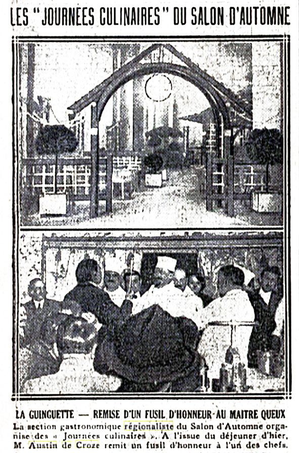 remise d'un prix par Austin de Croze 6 novembre 1924